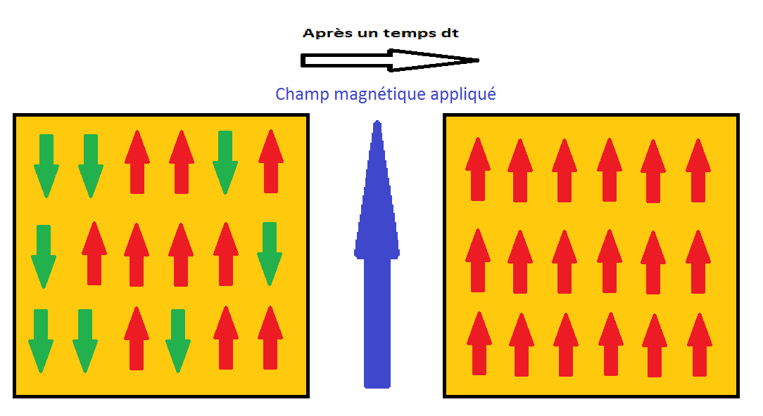 Saturation de l'aimantation de grain superparamagnétique suite à l'application d'un champ magnétique